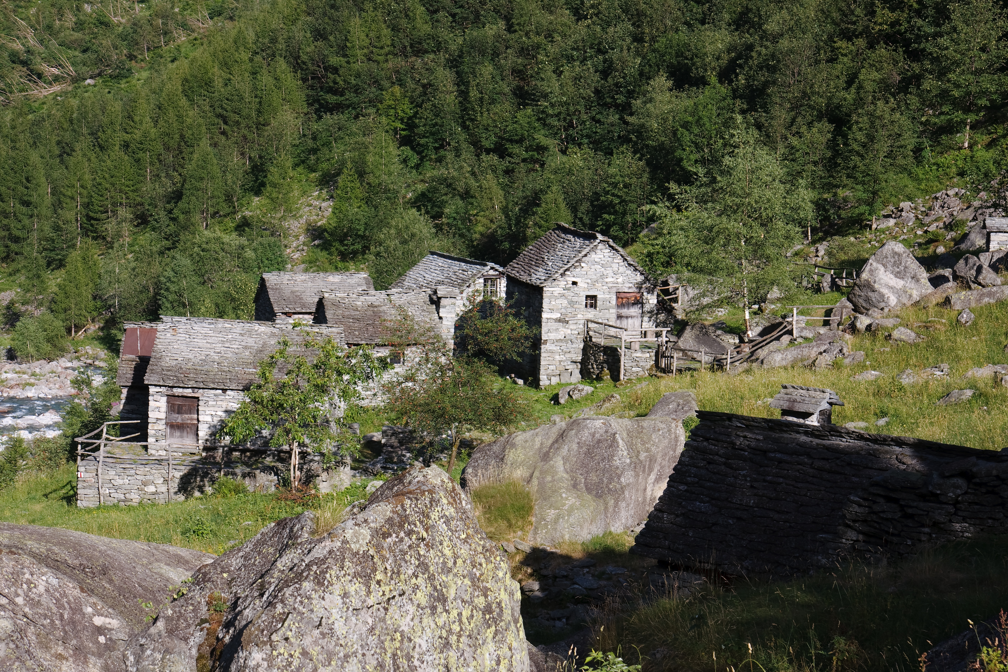 Die Alp Calnègia im Sommer